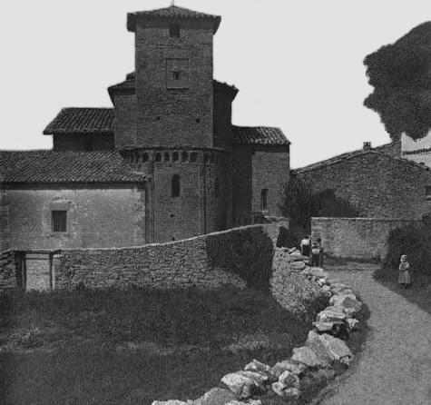 Part posterior de l'església de Santa Maria de Vilalleons. Frederic Bordas i Altarriba (ca. 1890)